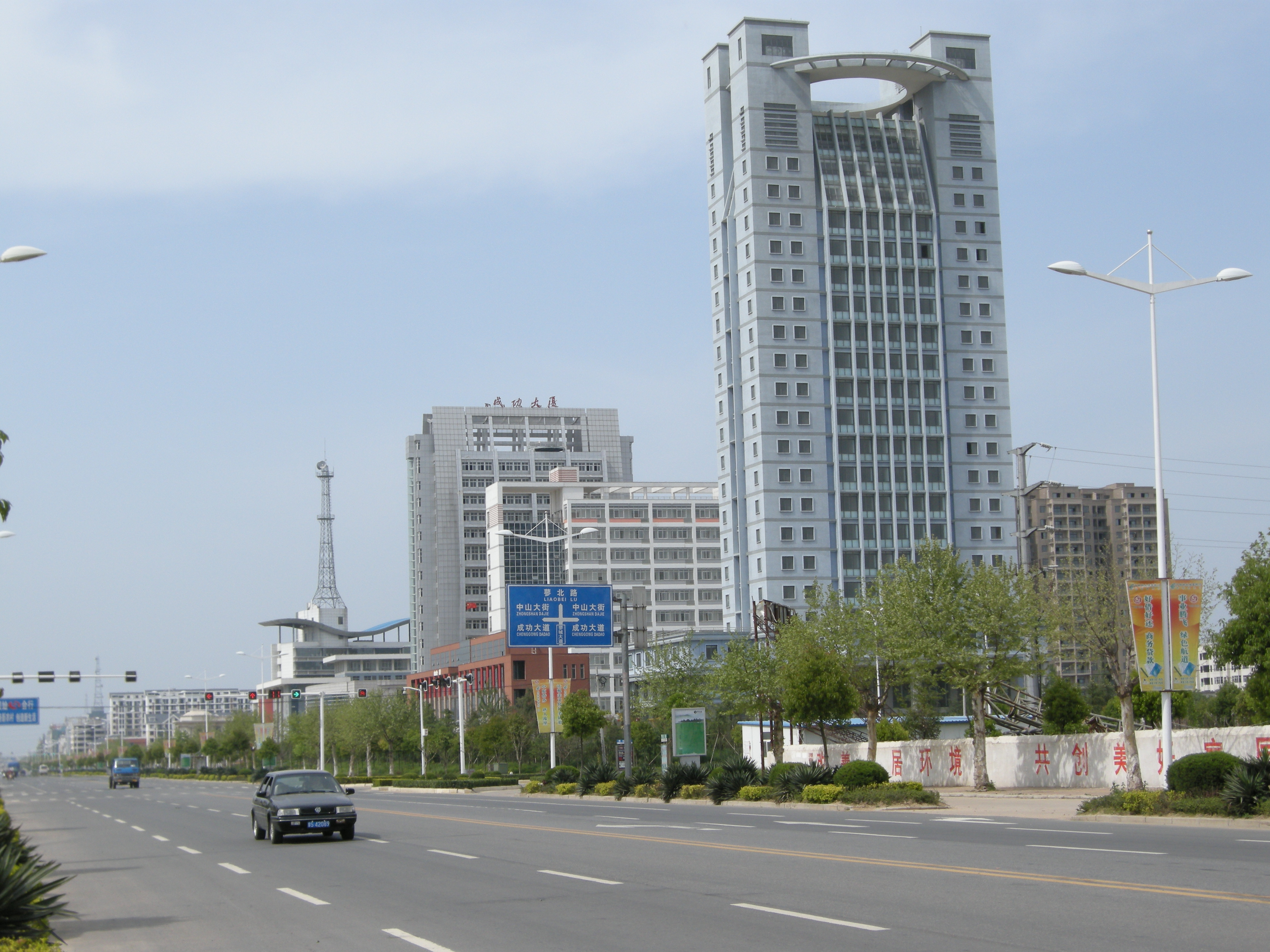 固始县城南新区一角